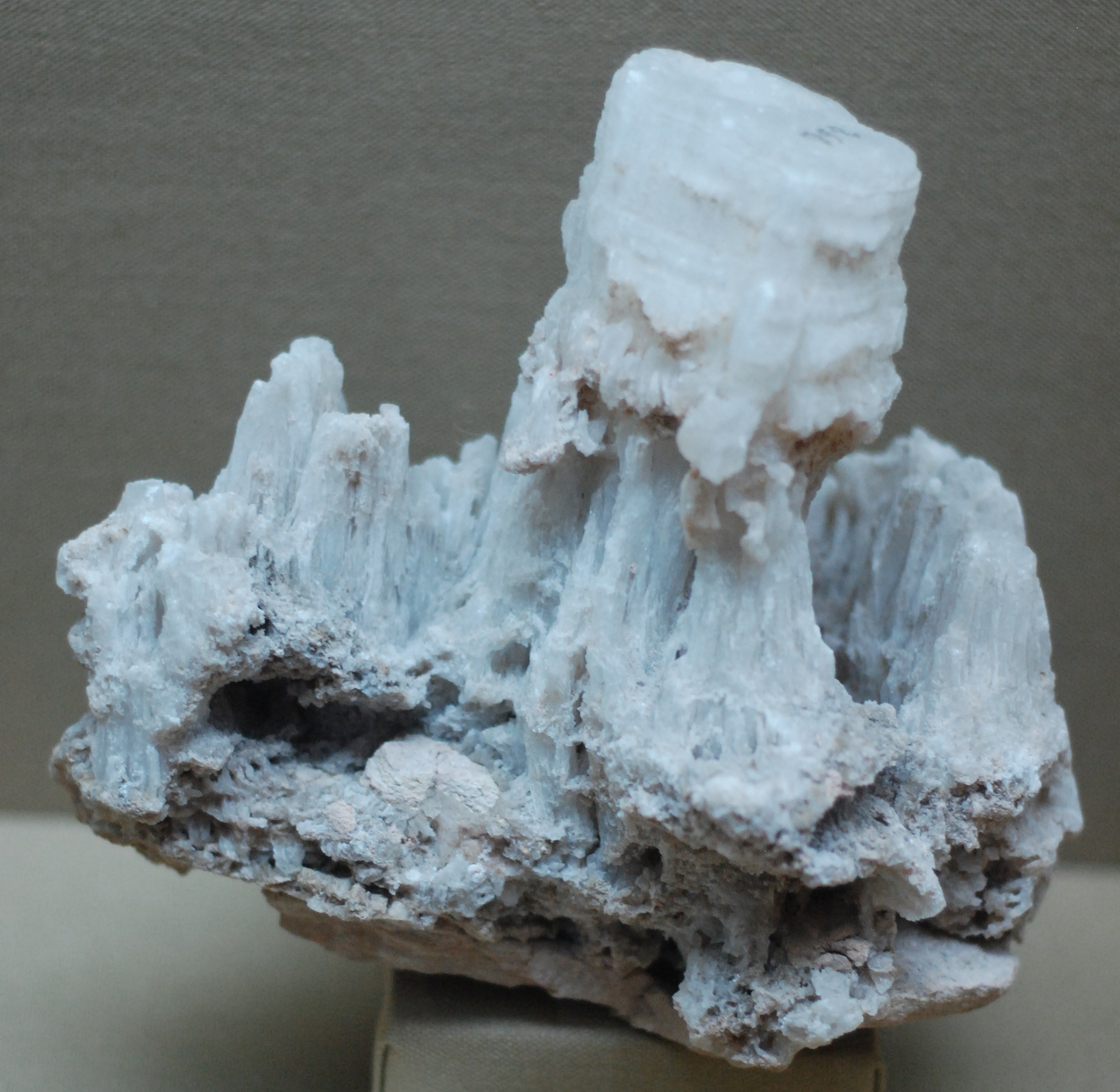 Evaporita (yeso). Roca sedimentaria detrítica. Malargüe, Mendoza, Argentina.